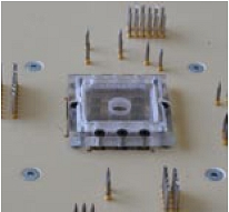 MCA-CP Chipadapter